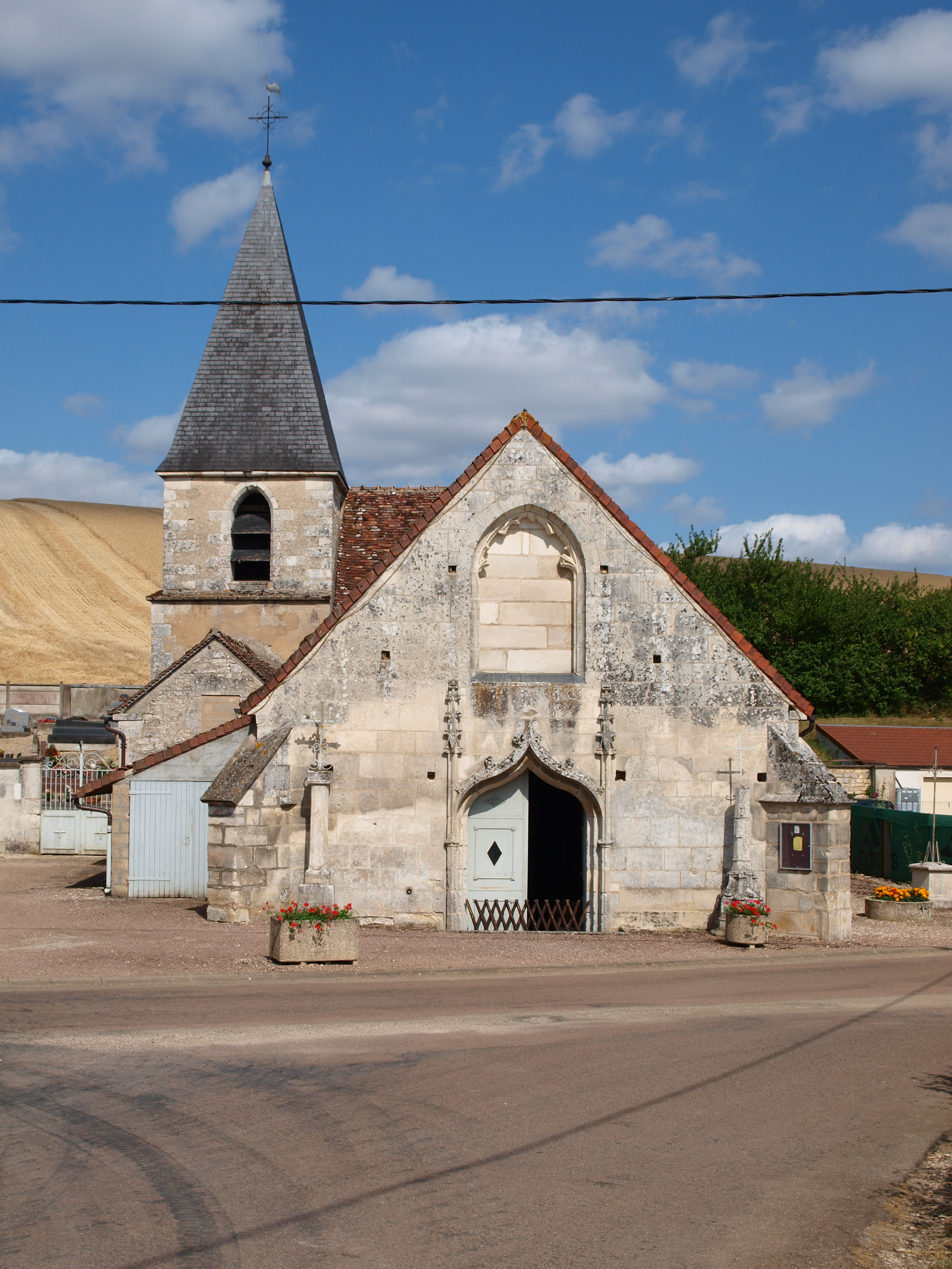 Église Saint-Martin de Mouffy (Yonne, France)